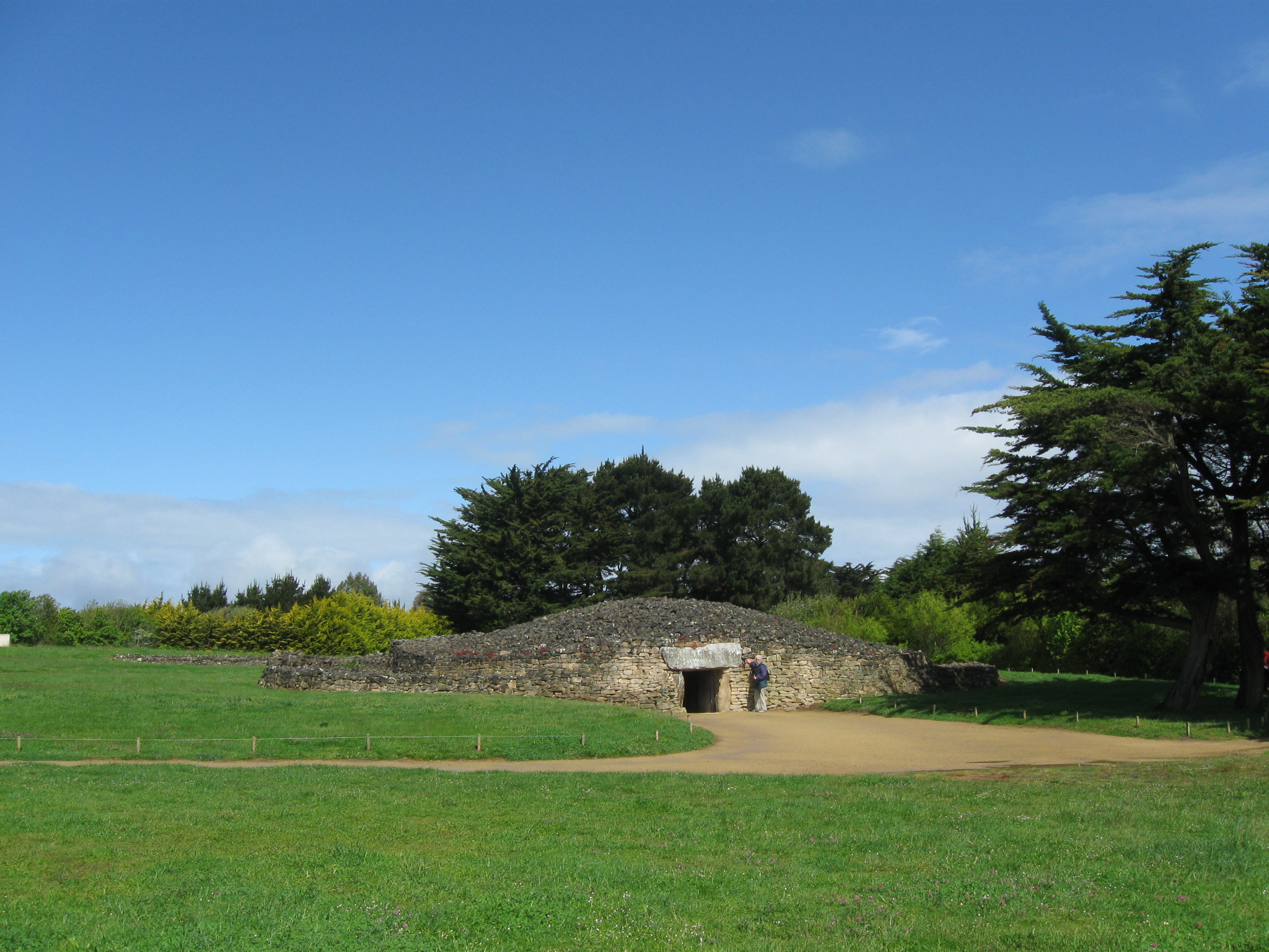 Cairn Table des Marchand, Locmariaquer, Morbihan